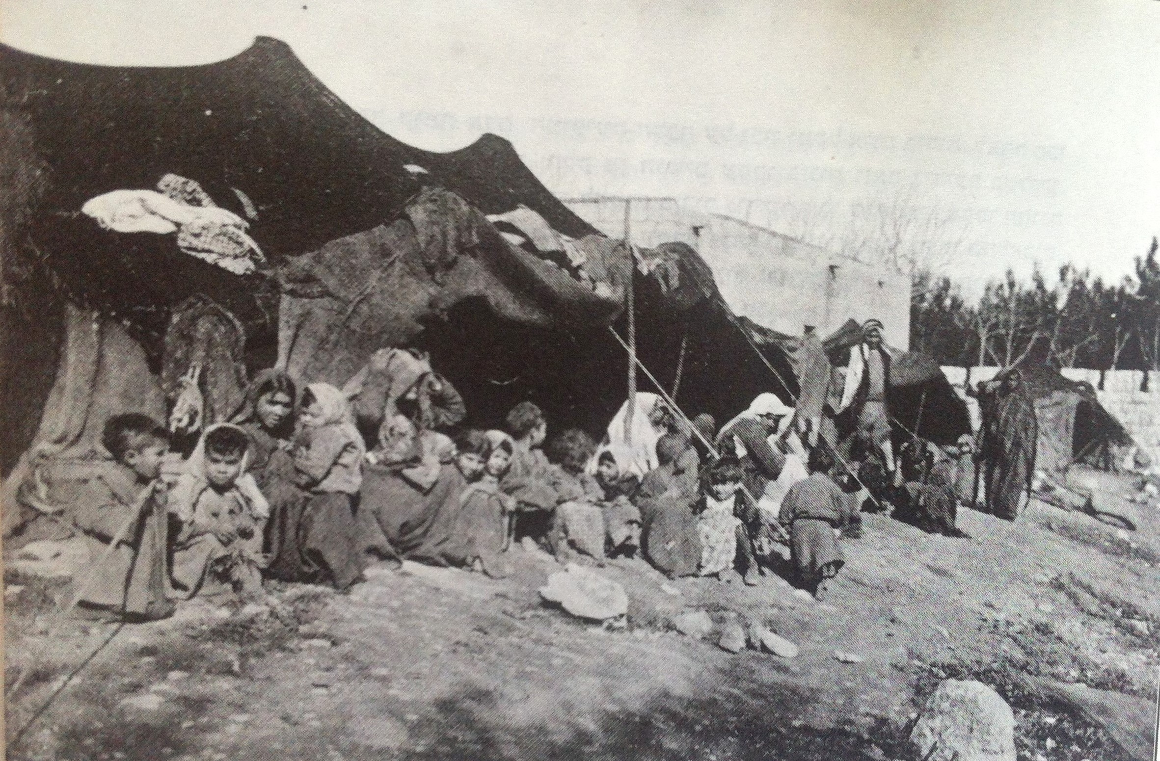 מאהל צוענים מצפון לשער שכם